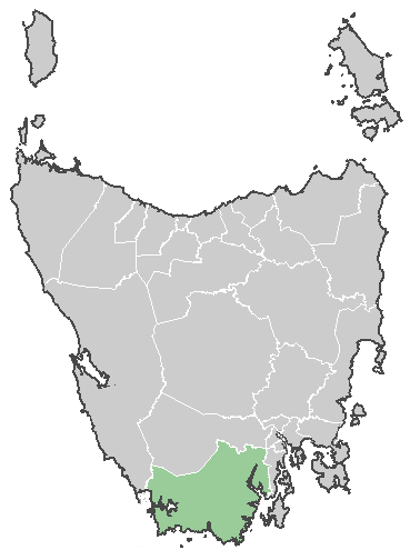 Carte du conseil de la vallée Huon